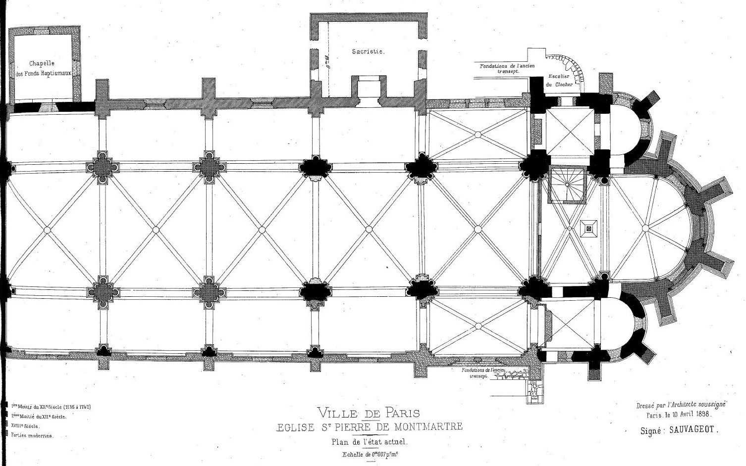 Procès-verbal de la Commission Municipale du Vieux Paris, page 47